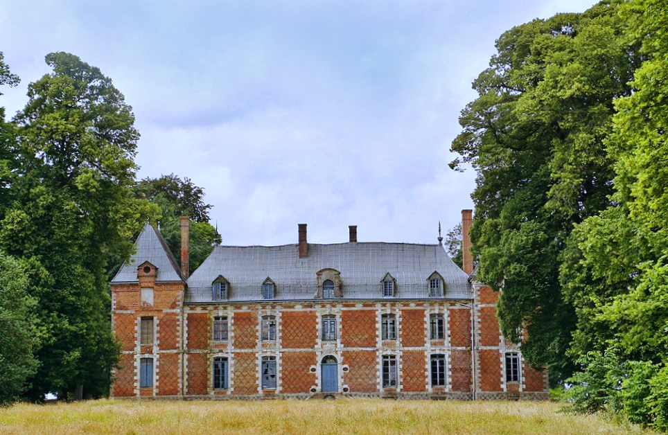 Le Château